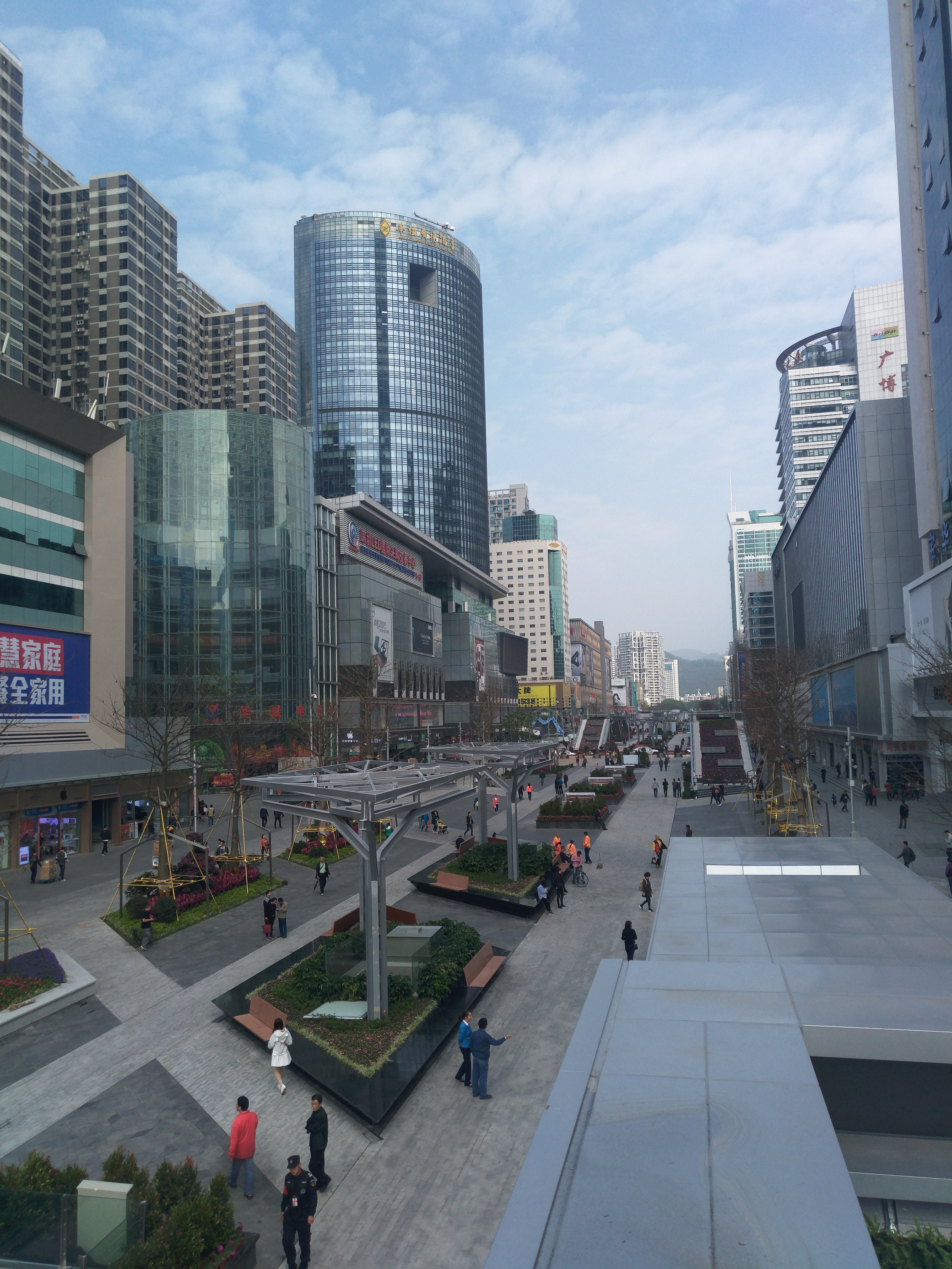 2017年重新开放的华强北步行街